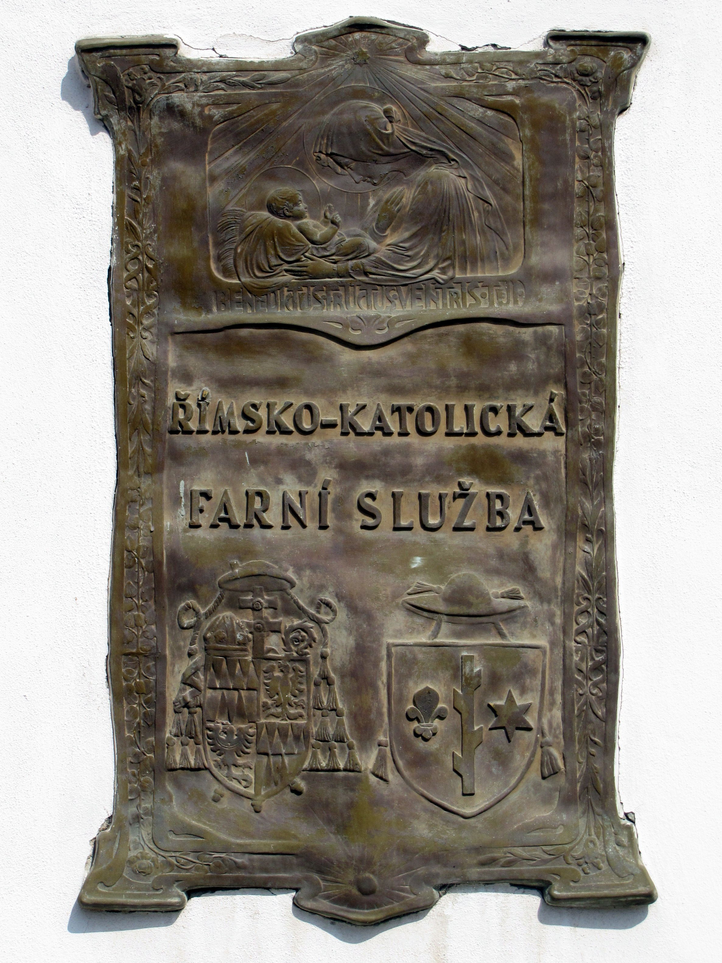 Deska u vchodu do římskokatolické fary v Kyjově na Palackého ulici. V horní části je vyobrazena Panna Maria s Ježíškem a nápisem "BENEDICTUS FRUCTUS VENTRIS TUI" (česky: Požehnaný plod života Tvého - citát z modlitby Zdrávas Maria, resp. z Bible L 1,42). Vlevo dole znak olomouckého arcibiskupství a vpravo kyjovského děkanátu.